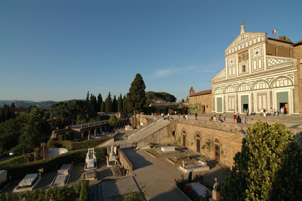 Firenze, Toscana, ItaliaSan Miniato di Sera